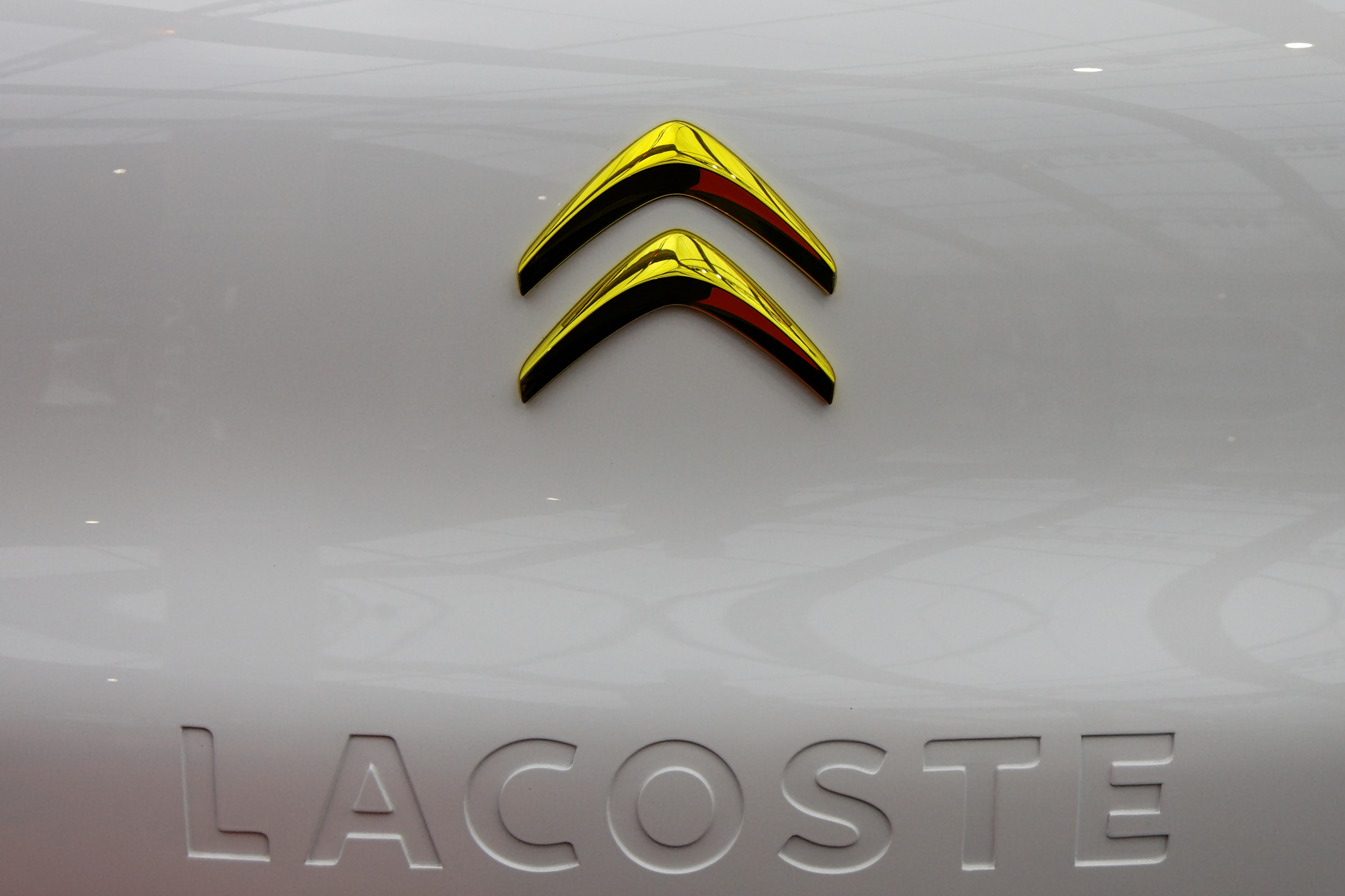 La Citroën Lacoste exposée devant le dôme des Invalides lors du festival automobile international 2011.